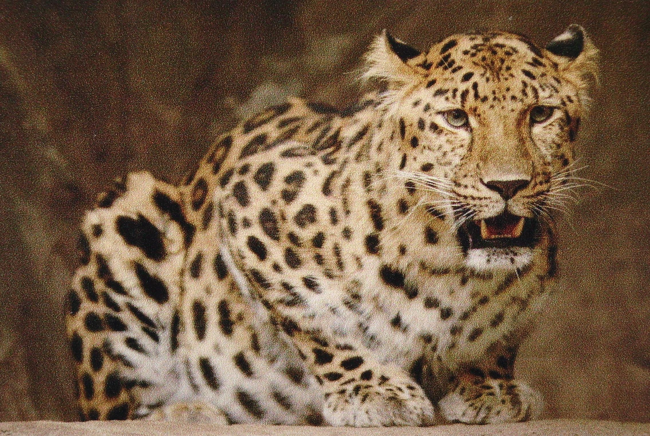 Levhart mandžuský; ZOO Olomouc